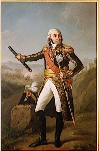 Copie d'après un original de Vien commandé par Napoléon Ier pour la salle des maréchaux du palais des Tuileries à Paris, détruit dans l'incendie de 1871